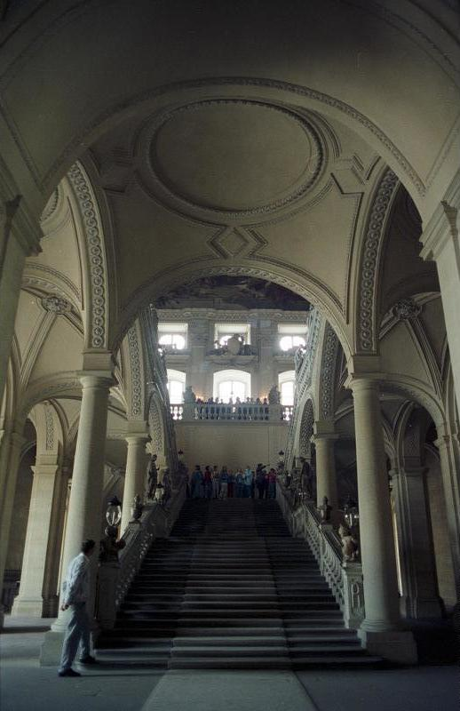 Juni 1988 Würzburg - Residenz Residenz von innen (Große Treppe)